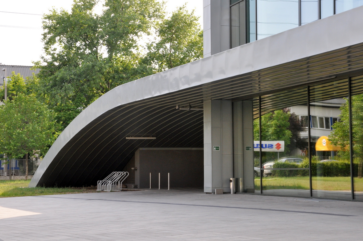 Autóklub-székház, az "a" betű szára, Berda József utca, Budapest